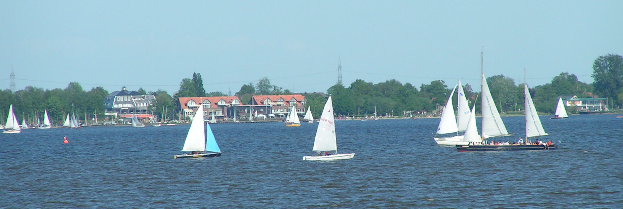 Segelschiffe auf dem Dümmer